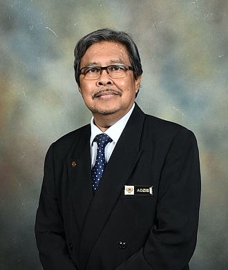 Mantan Ketua pengarah DBP